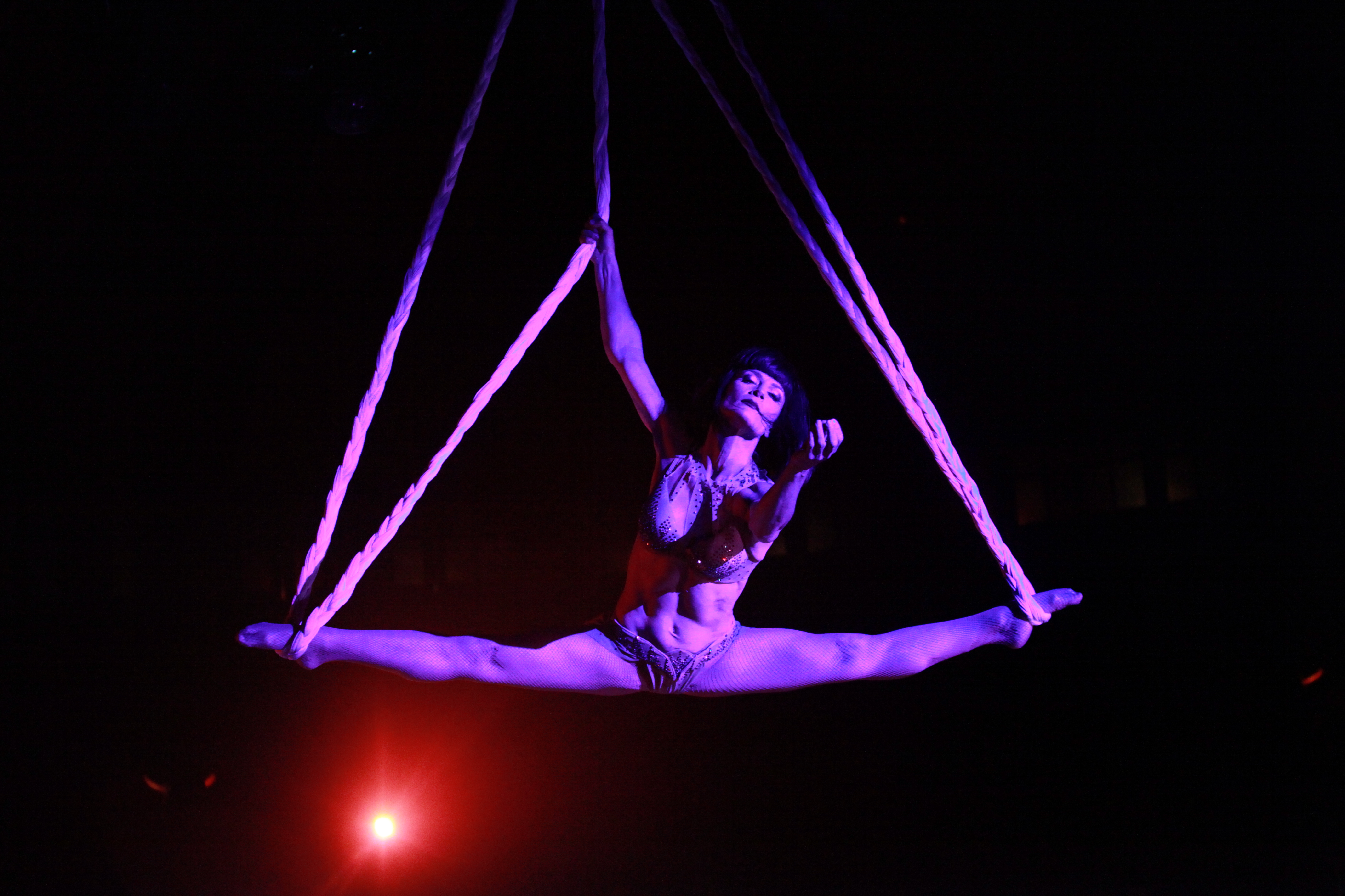 Dreya in her original aerial creation for Teatro ZinZanni's production of Hail Caesar!